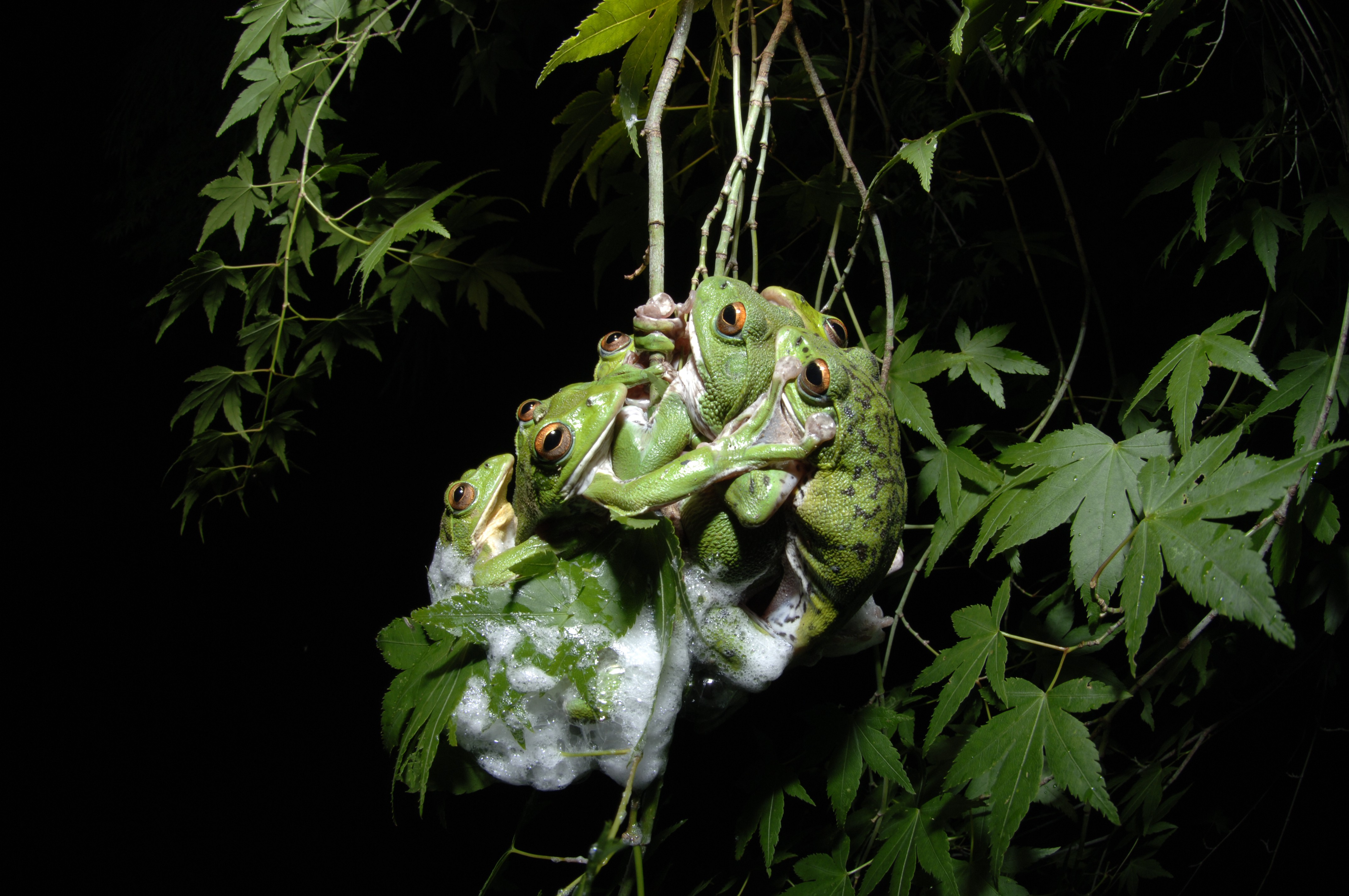 1個体のメスに多数のオスが群がる．大台ケ原にて．詳細